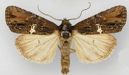 Bryolymnia semifascia male